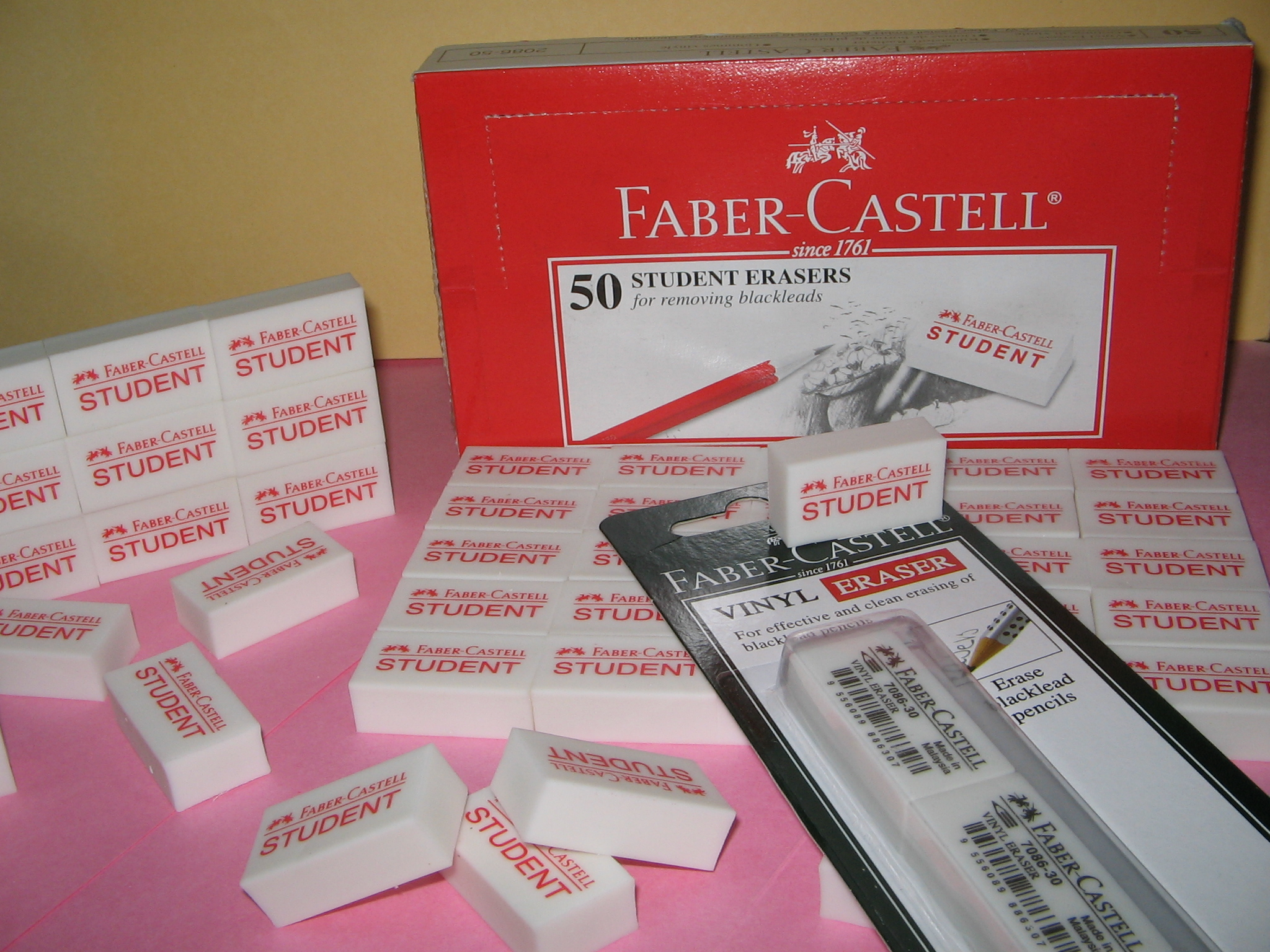 Roba @ Mohamed Yosri